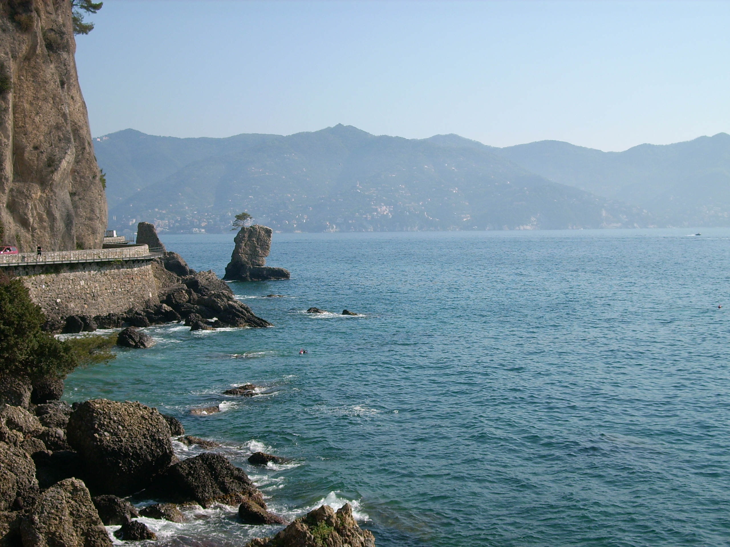 Scogliera di Paraggi (Santa Margherita Ligure), Liguria, Italia